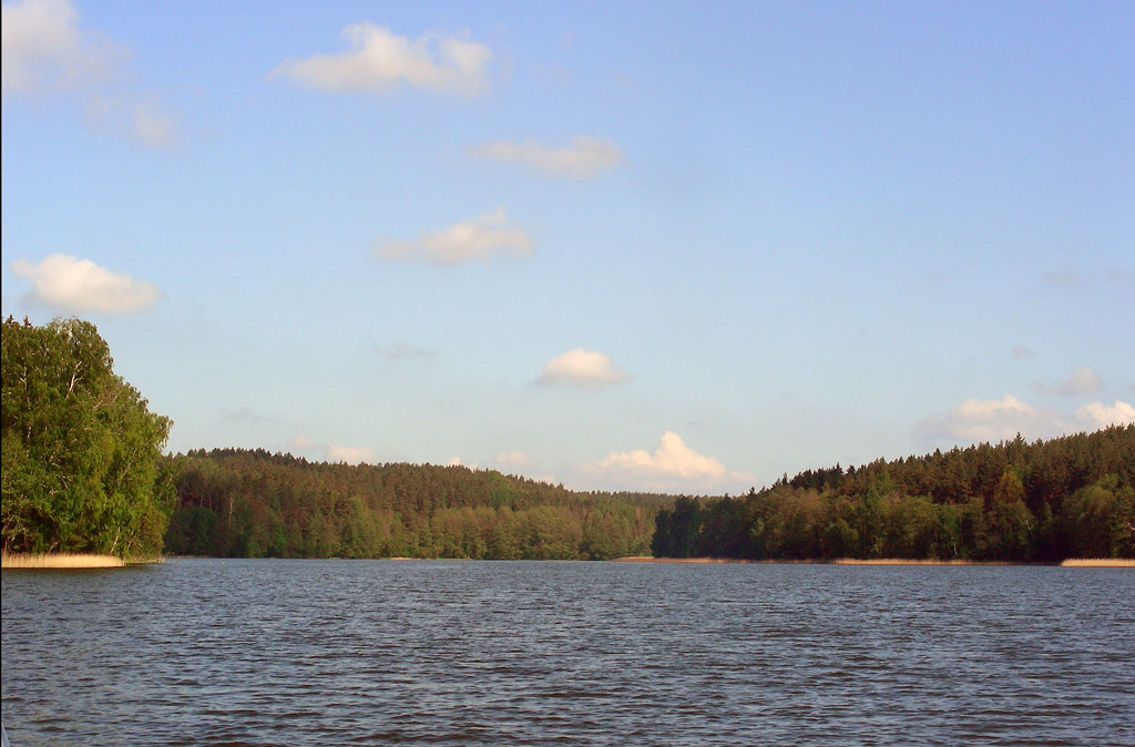 Jezioro Tyrkło, Tirklo-See, Masurische Seenplatte, Woiwodschaft Ermland-Masuren, Polen.